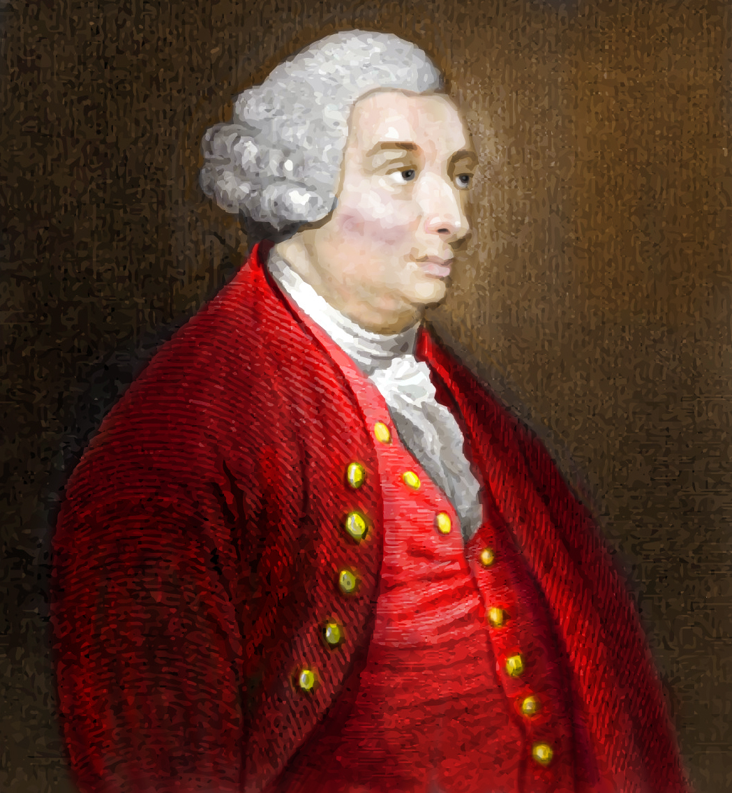 Fotocolorización de un grabado de David Hume Original: David Hume 1754.jpeg